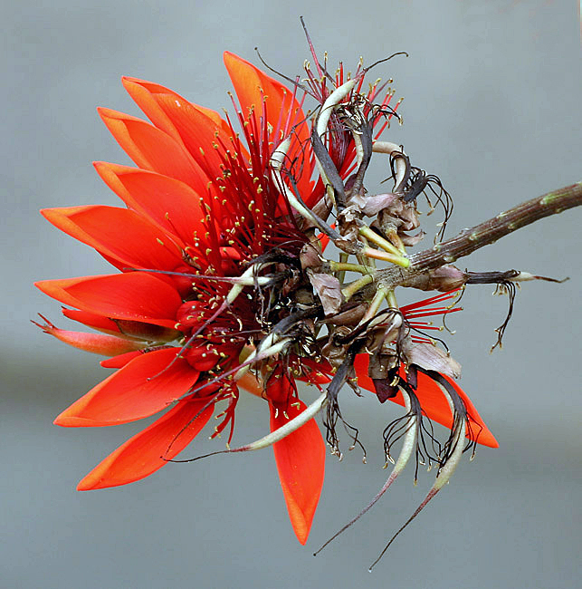 Indian Coral Tree Erythrina variegata in Kolkata, West Bengal, India.